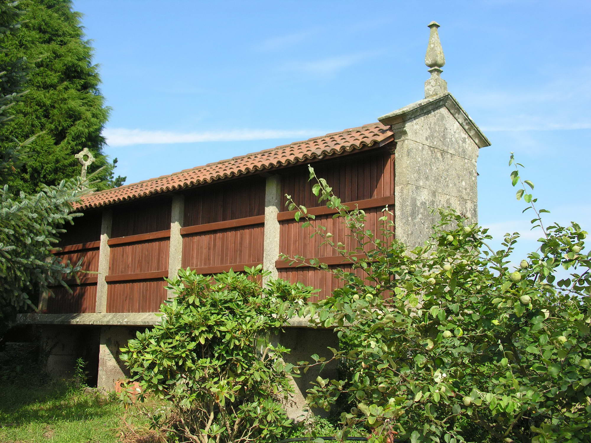 Hórreo, Oroso, Galiza.